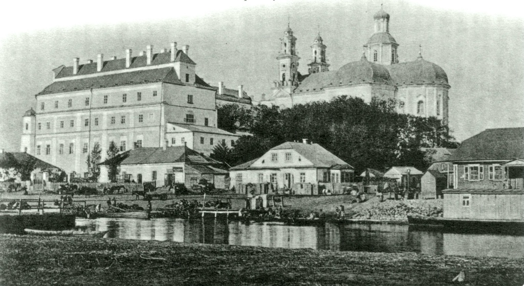 Від на калегіум і езуіцкі касцёл з правага берага Піны.